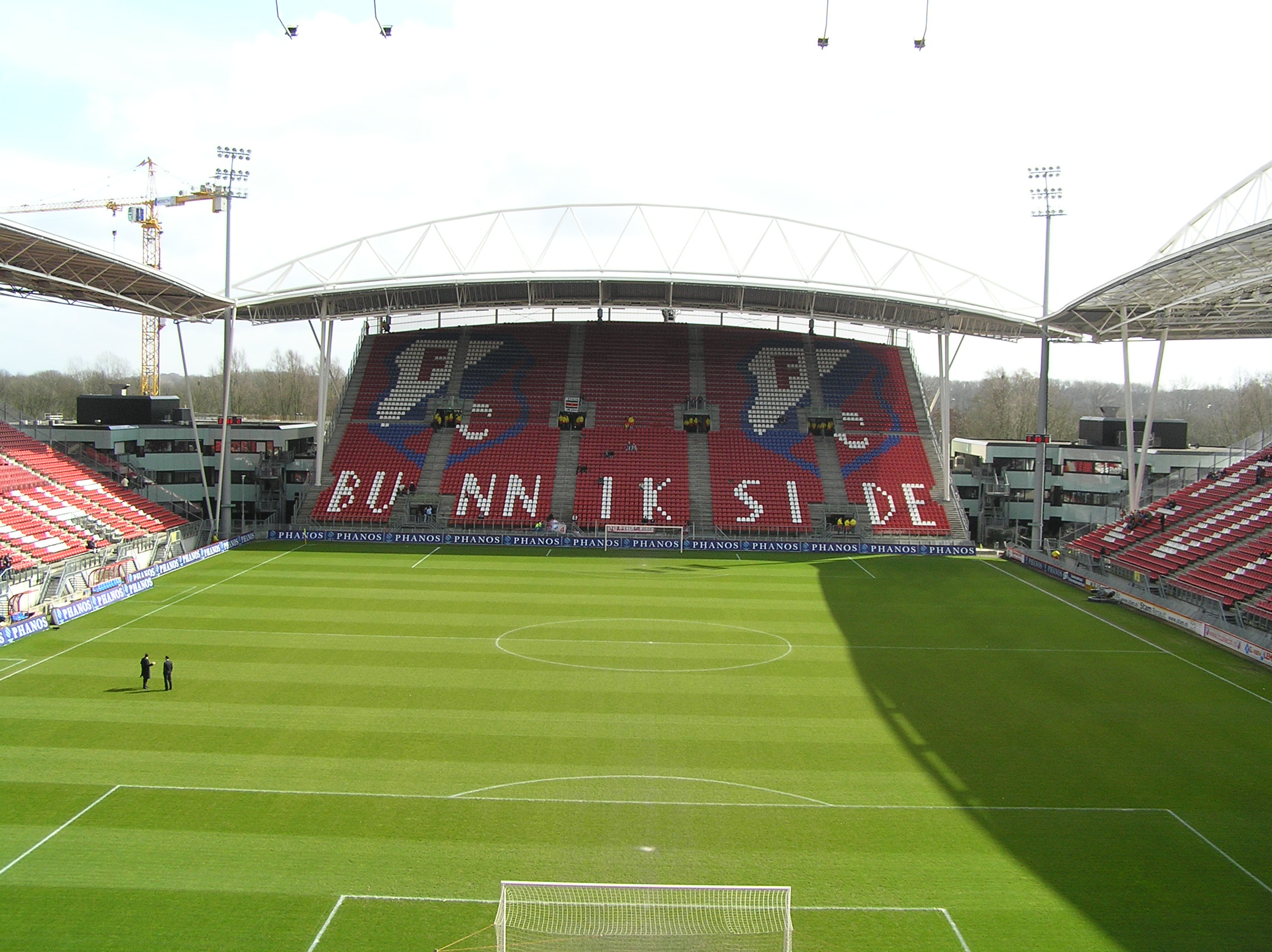 Bunnikside, voor aanvang van de wedstrijd FC Utrecht - Heracles (26/03/2006)